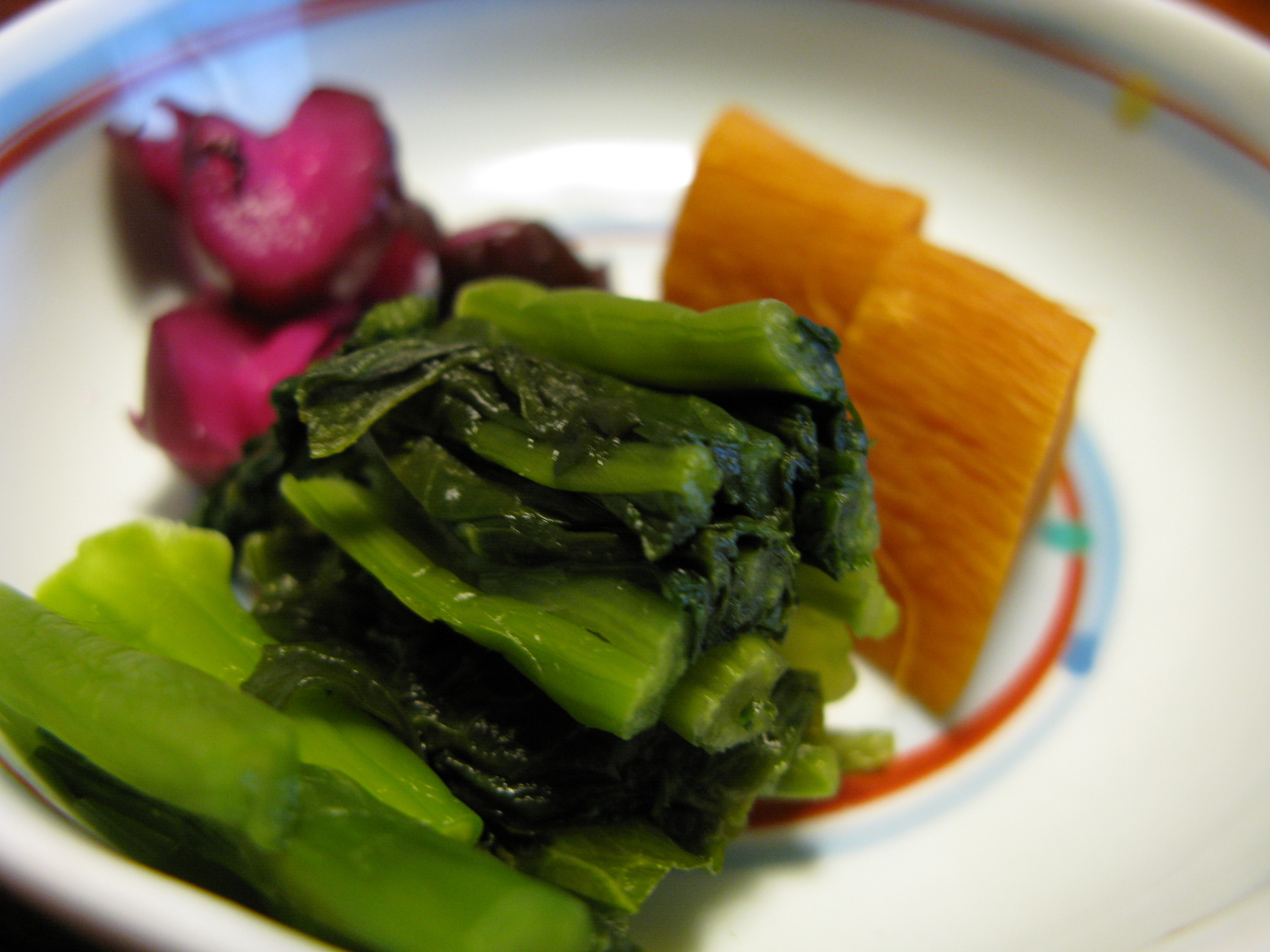 漬物（神奈川県足柄下郡箱根町宮ノ下66、「晴遊閣 大和屋ホテル」[1]）